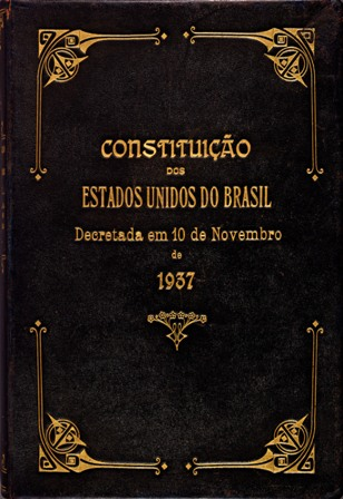 Foto da Constituição do Brasil de 1937.